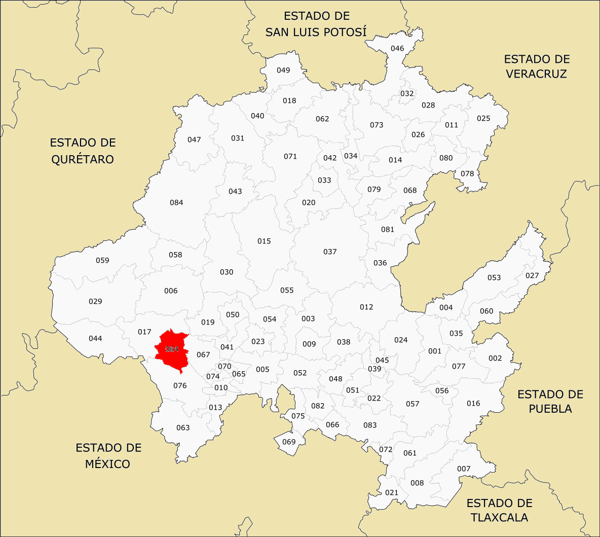 Municipios de Hidalgo